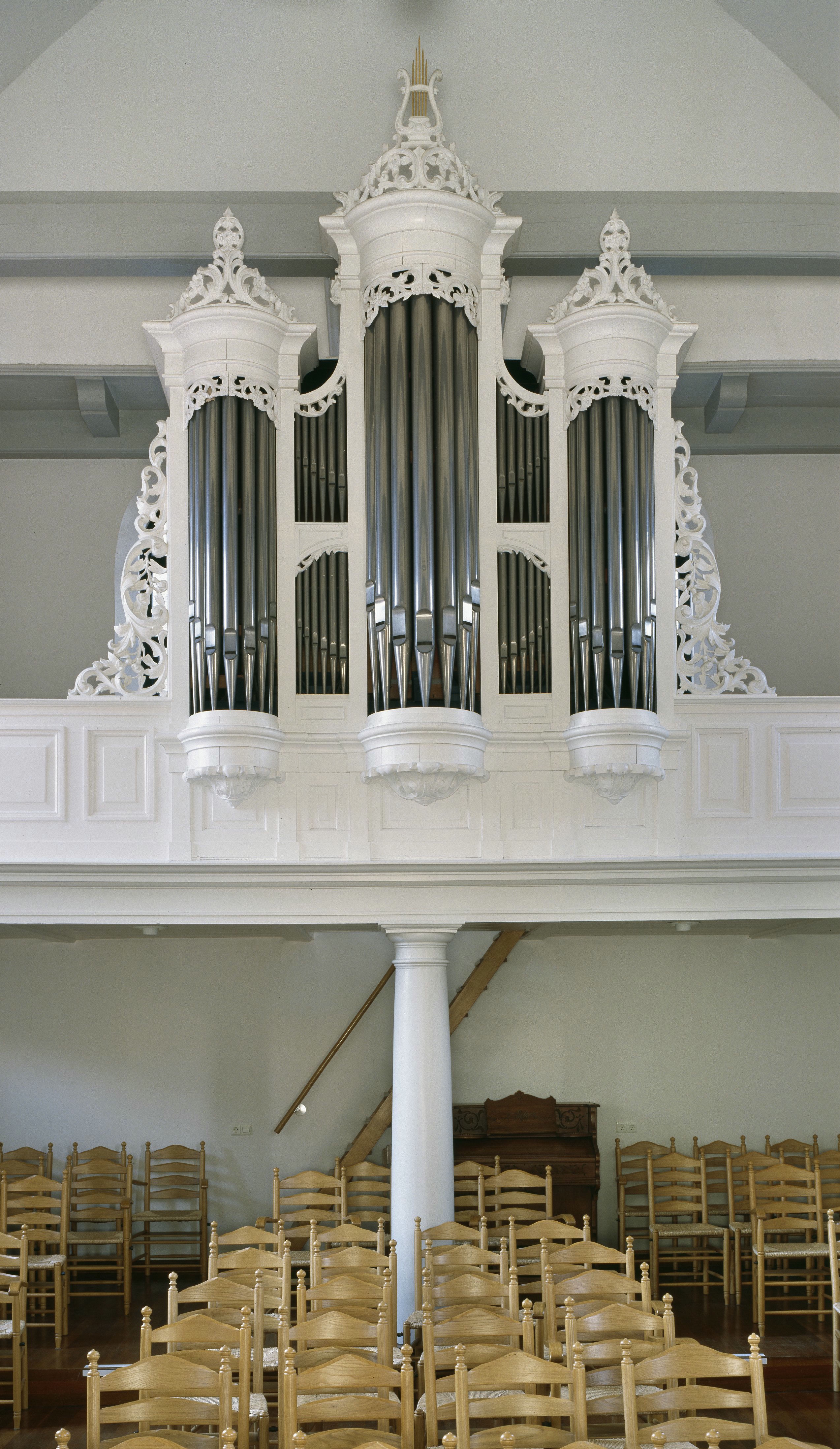 Doopsgezinde Kerk: Interieur, aanzicht orgel, orgelnummer 637 (opmerking: Gefotografeerd voor Het Historische Orgel in Nederland 1894-1901, bladzijde 293)